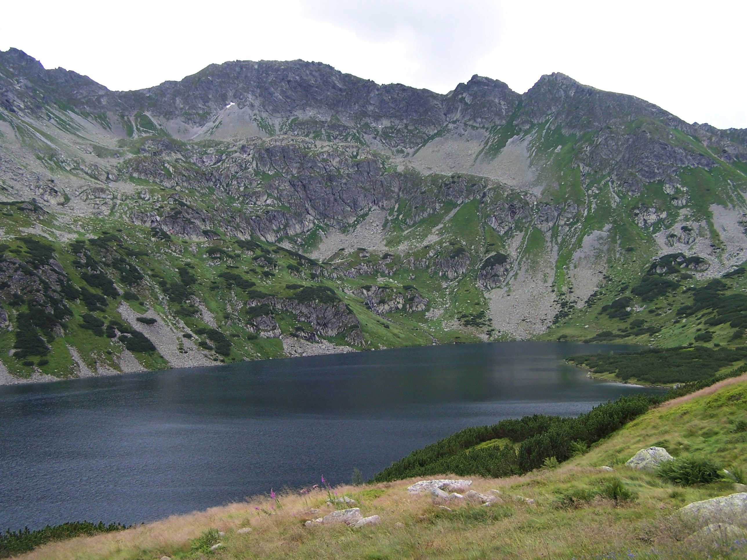 Szpiglasowa Przełęcz, Szpiglasowy Wierch, Wyżni Kostur, Niżni Kostur